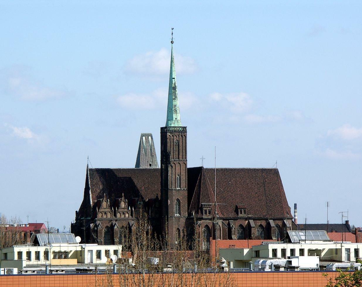 Widok kościoła z Galerii Dominikańskiej.